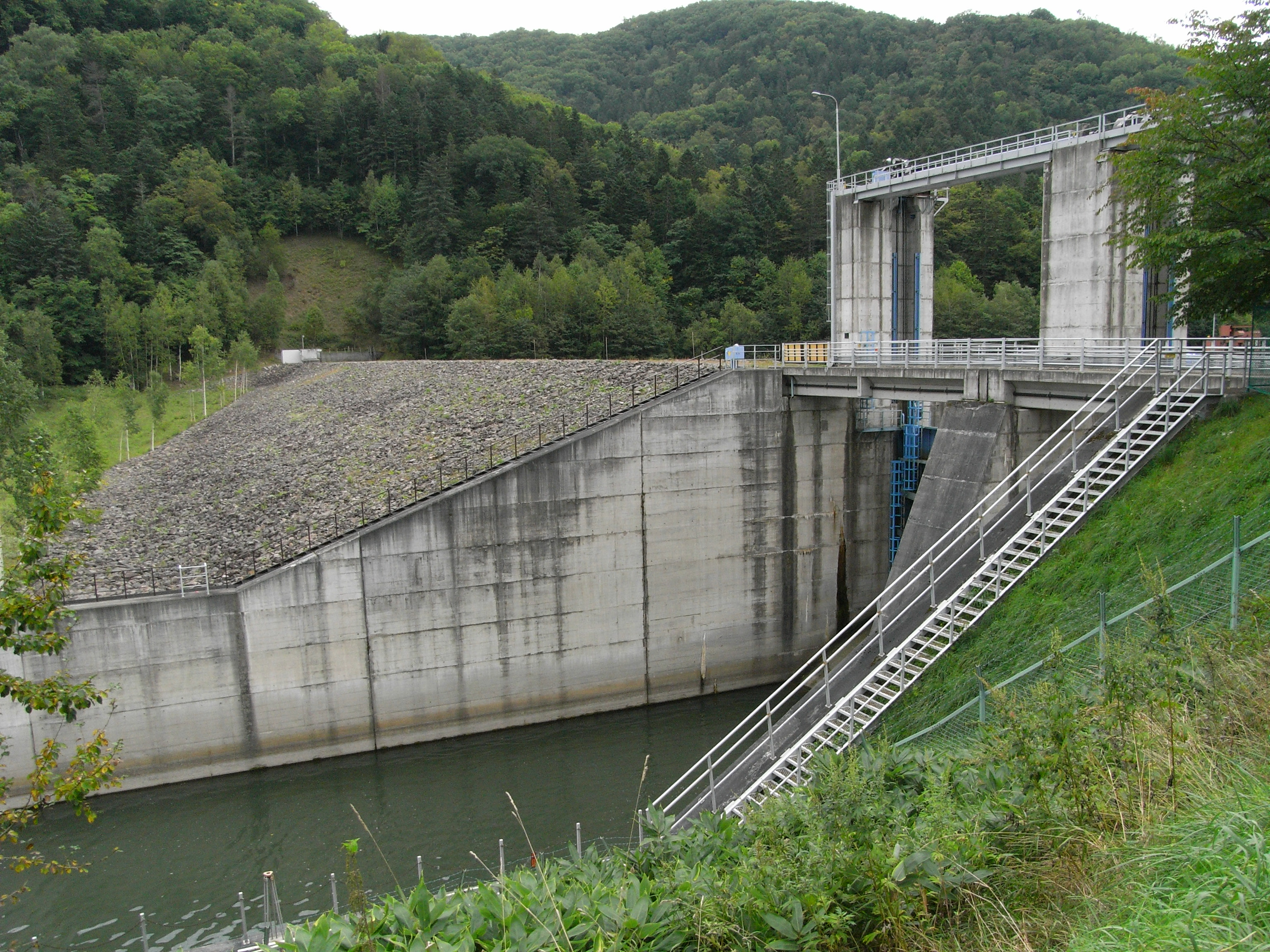 Dam